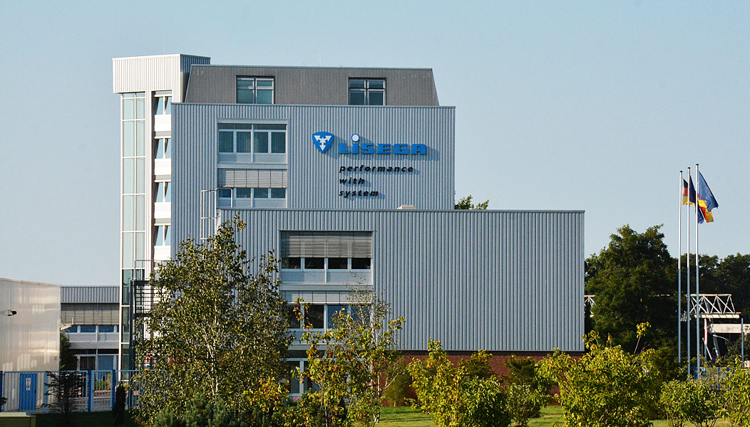 Zeven Aspe Lisega